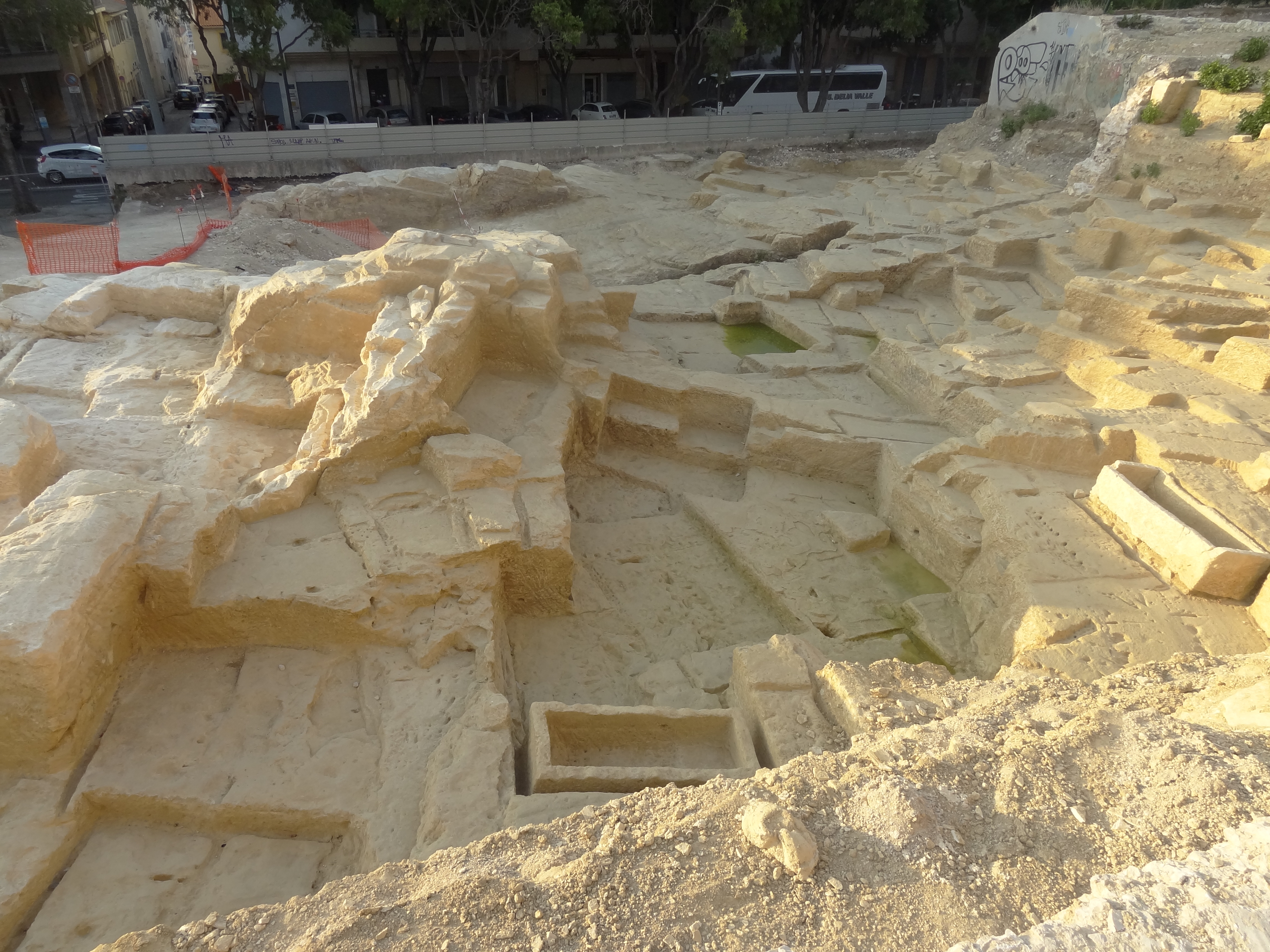 Vue de la carrière Corderie zone exploitée du début du VIe s av JC au début du Ve s av JC, avec 3 sarcophages non extraits etc..